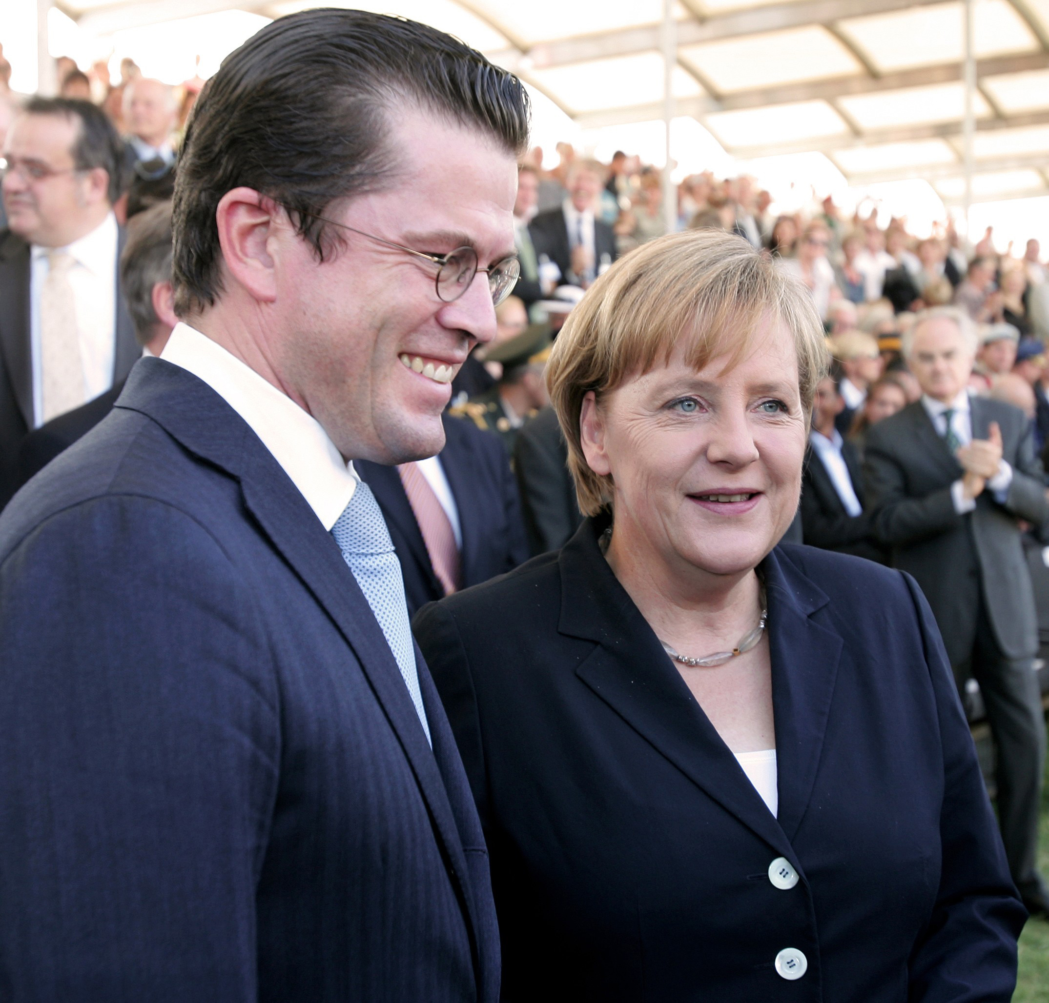 Der Bundesminister der Verteidigung, Karl-Theodor zu Guttenberg und die Bundeskanzlerin, Dr. Angela Merkel, kurz vor Beginn der Veranstaltung. Anlass ist das Feierliche Gelöbnis der Rekruten der 4. und 8. Kompanie des Wachbataillons beim Bundesministerium der Verteidigung. ©Bundeswehr/S.Wilke